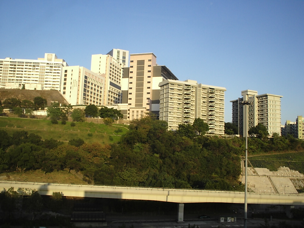 PrincessMargaretHospital